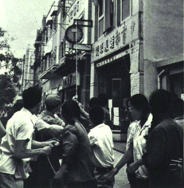 1966-11 1966年红卫兵砸掉亨得利牌子